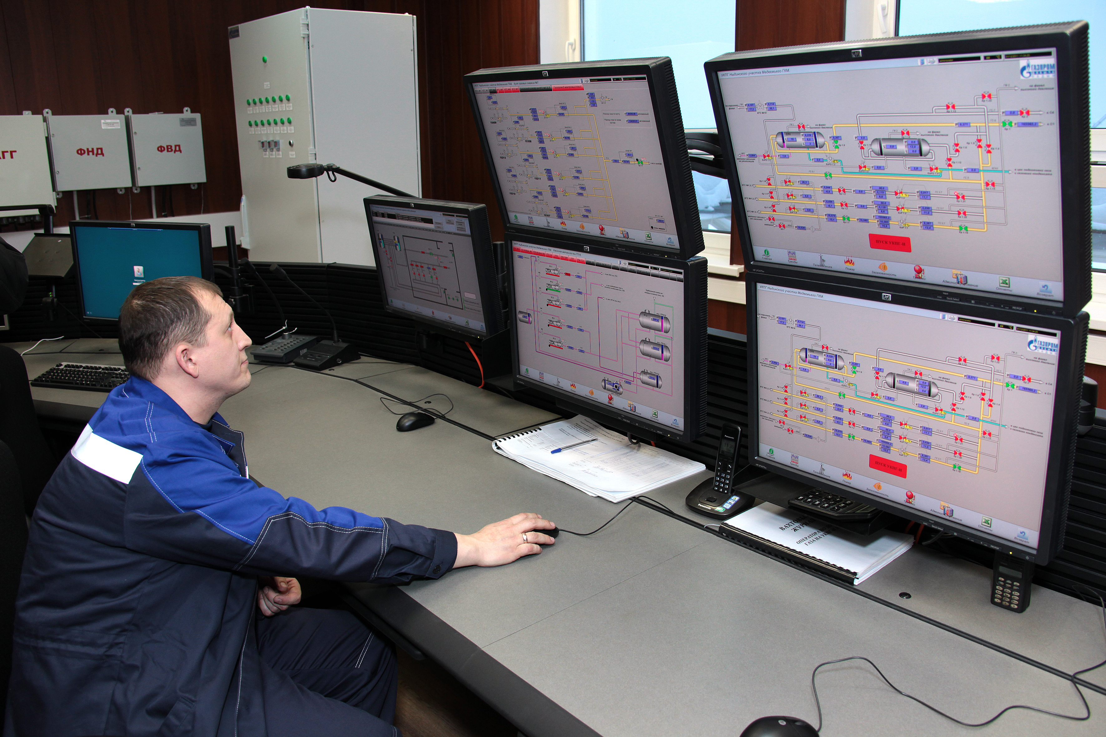 За пультом управления УКПГ-Н на Ныдинском участке Медвежьего месторождения. Надымский район, Ямало-Ненецкий автономный округ, Тюменская область. 1 декабря 2011 года